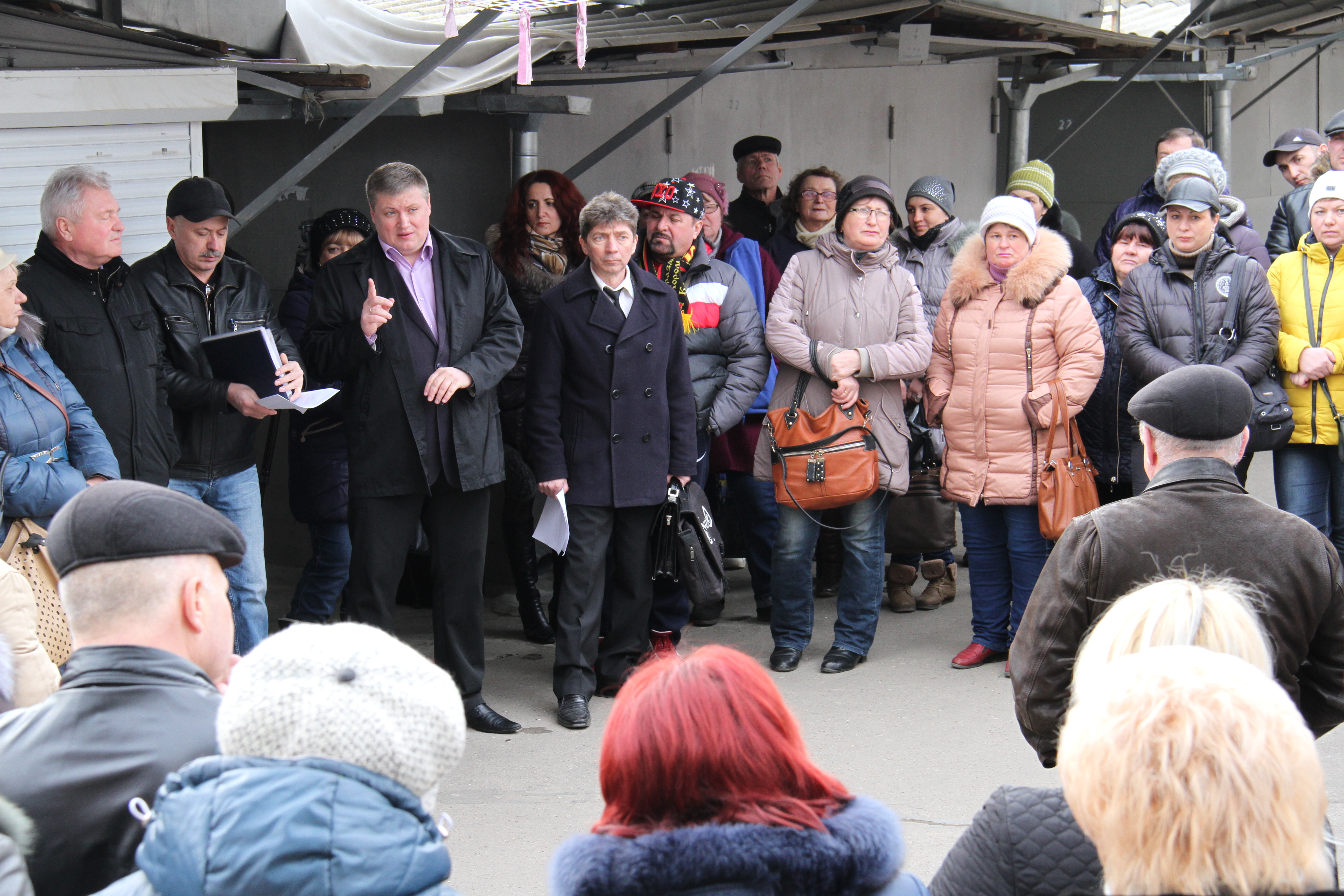 Олег Хоржан на акции патентщиков в 2016 году